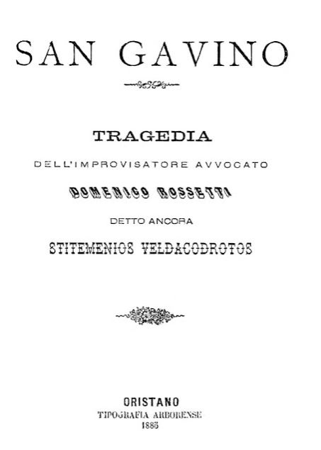 Cover of commedia Sa Gavino